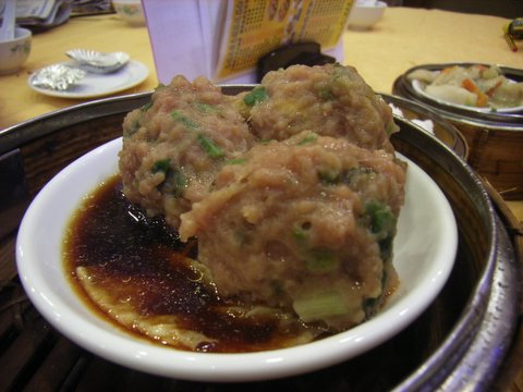 山竹牛肉球 Meat balls. User:Dim Sam WONG.